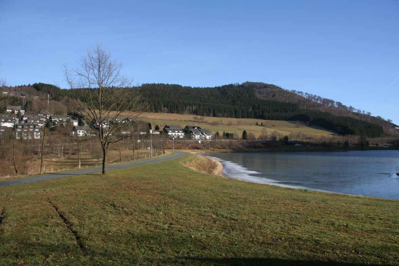 Damm des Hillestausees im Winter